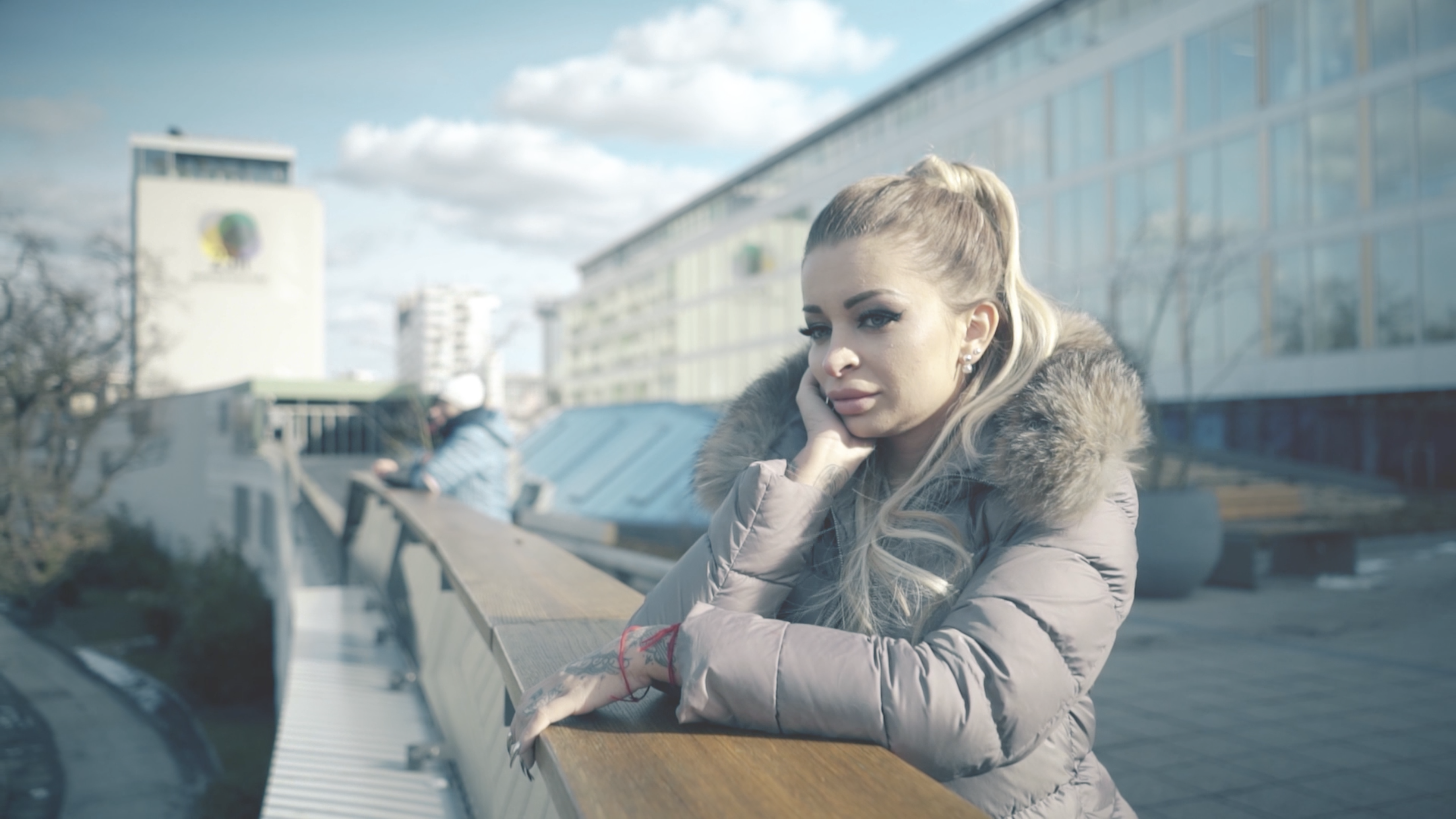 Katja Krasavice im Interview-Format "Germania"